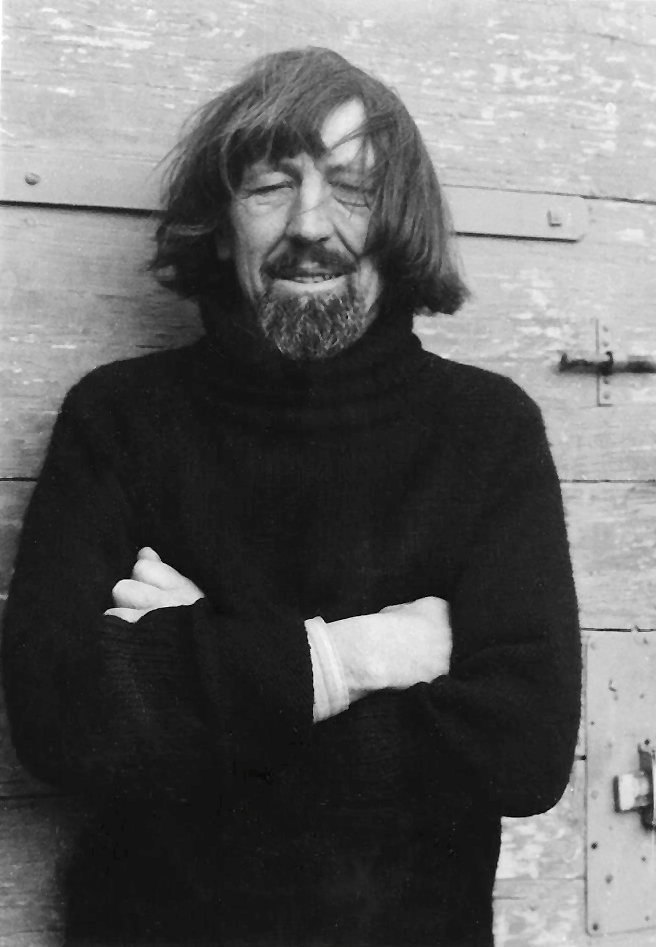 Portrait de Knud Viktor, né en 1924, artiste plasticien sonore, par Annala Magal, 1980